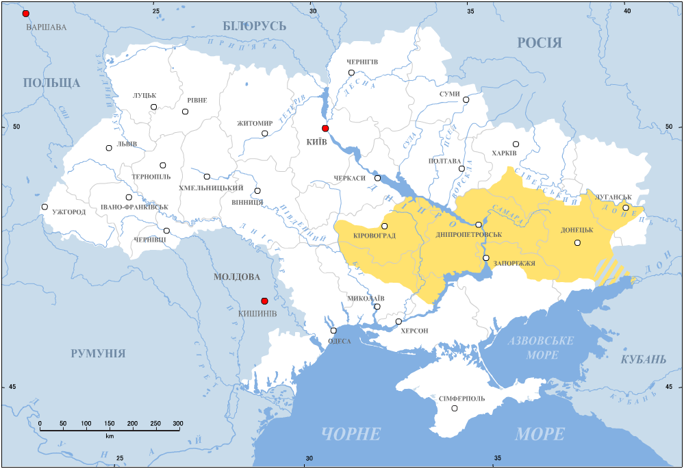 Запорожжя